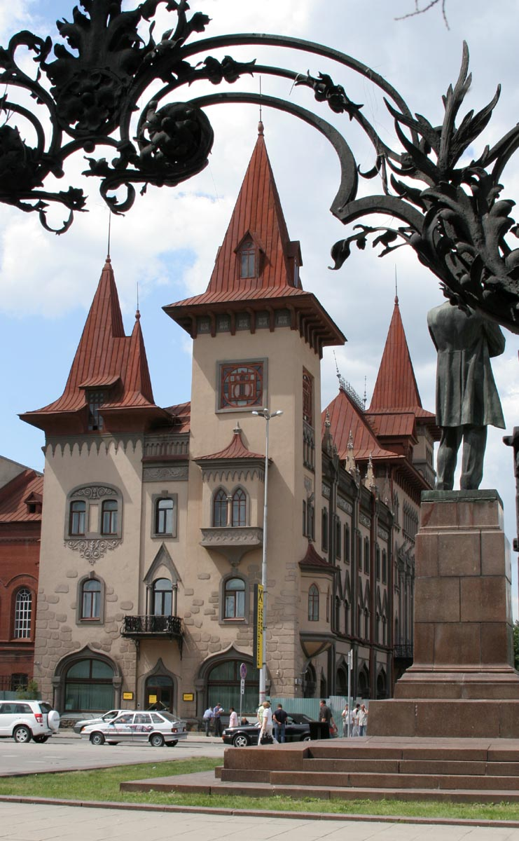 Саратов. Парк Липки. Ворота выходящие на улицу Радищева. Видна Саратовская консерватория